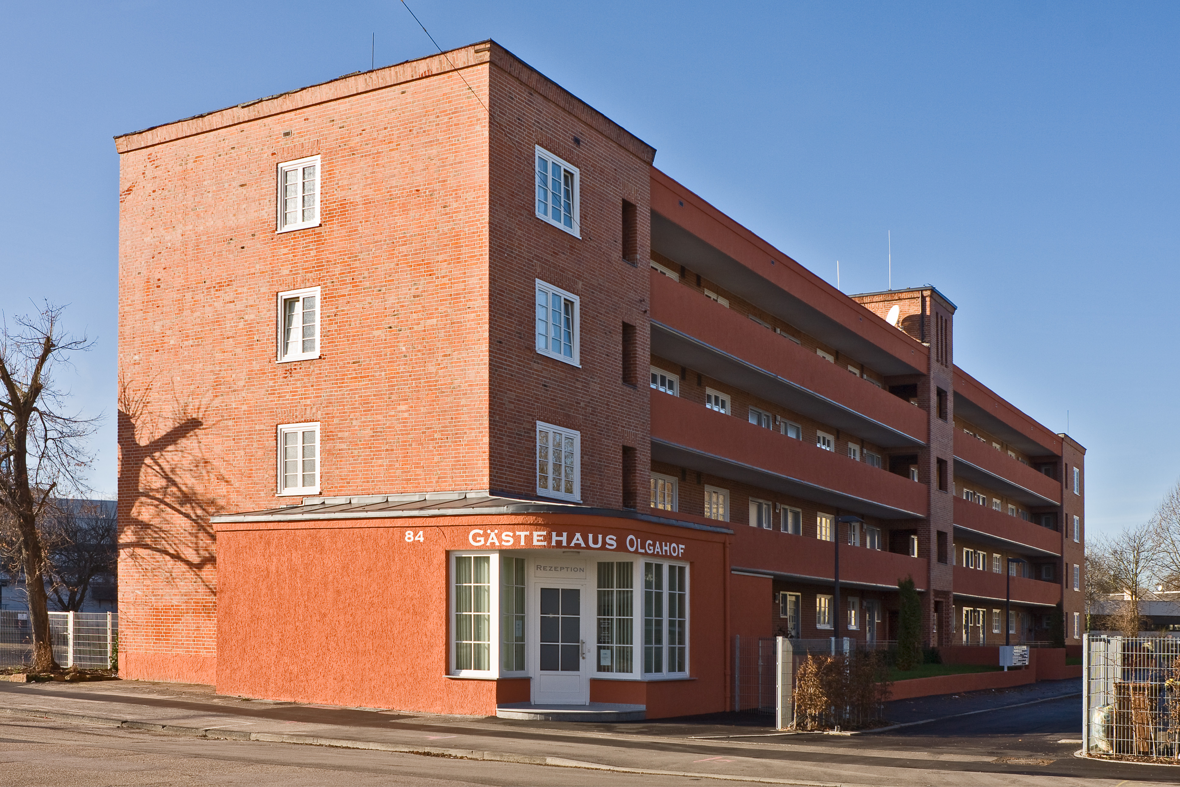 Das Laubenganghaus in Heilbronn Ende 2009